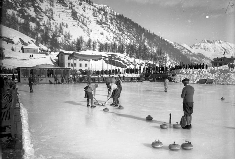 Das Curlingspiel, ein beliebter Wintersport auf den Eisflächen des Hochgebirges ! Wintersportler beim Curlingspiel, auch Eis-Schlitteln genannt, auf dem Eis in St. Moritz.